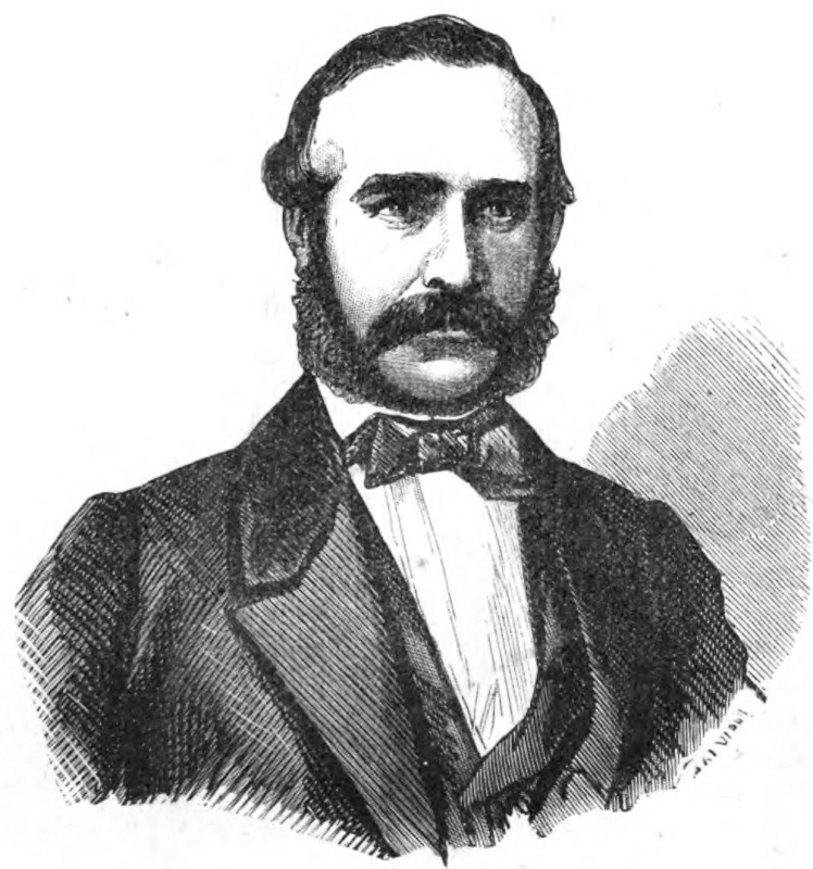 Ritratto di Federico Crema